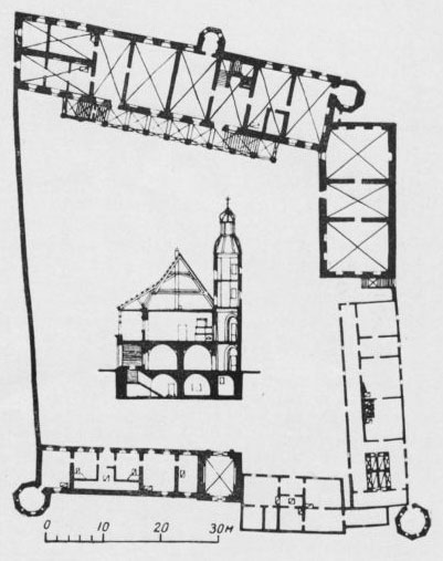 Быхаўскі замак. План і разрэз Беларуская (тарашкевіца): Быхаў (Bychaŭ). Замак, плян і разрэз